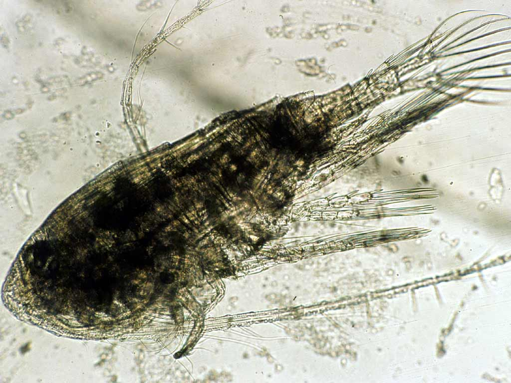 Diaptomus